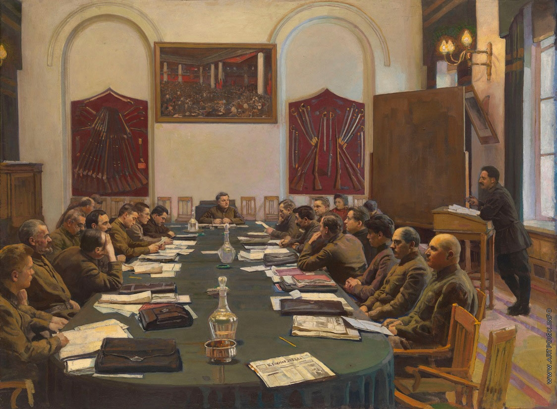 Бродский И. Название Собрание Реввоенсовета СССР, под председательством К.Е. Ворошилова Год создания 1928 Материал Холст, масло Размер 95,5 х 129,5